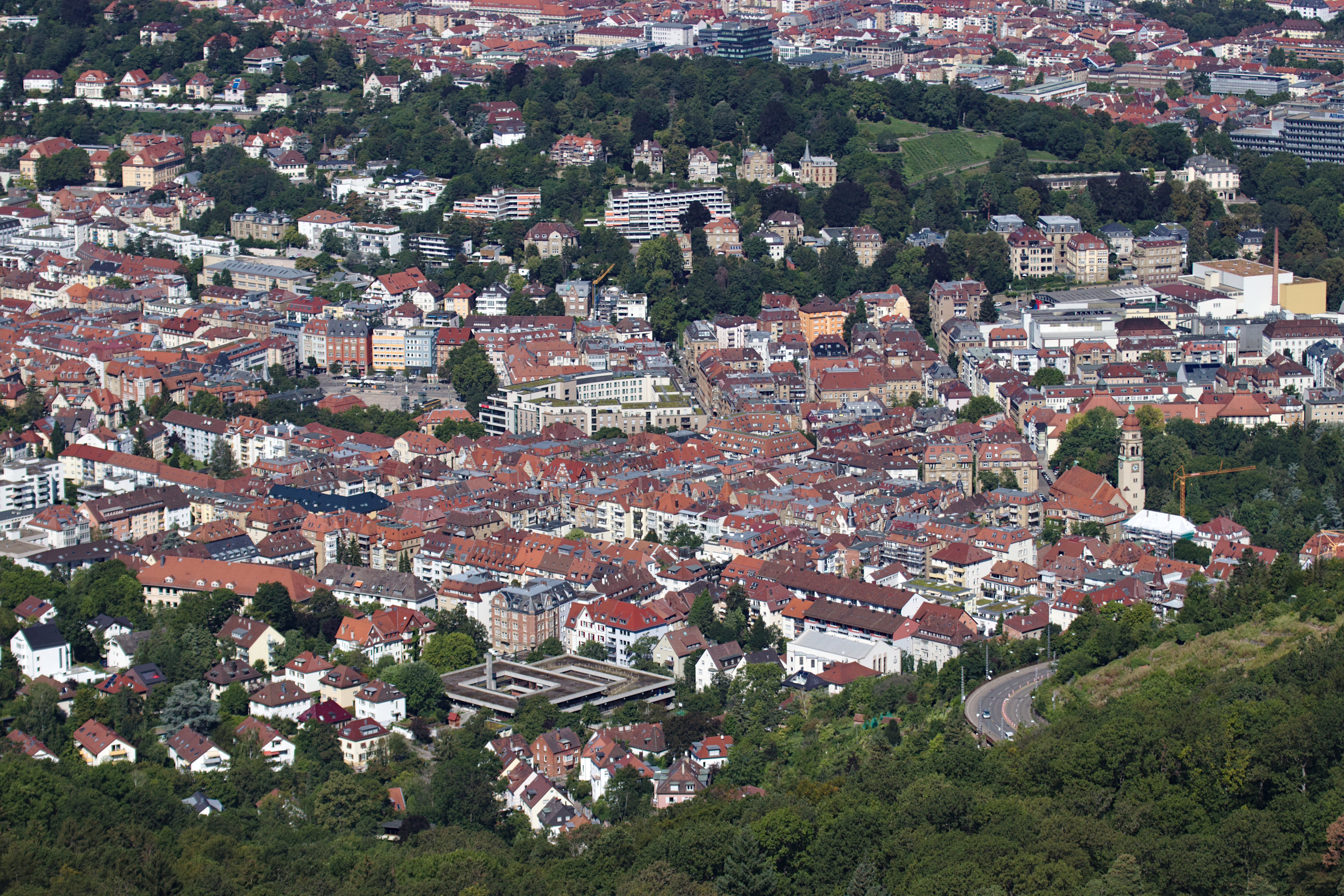 Der Stadtteil Lehen in Stuttgart-Süd, Baden-Württemberg, Deutschland. Aufnahme vom Fernsehturm Stuttgart.